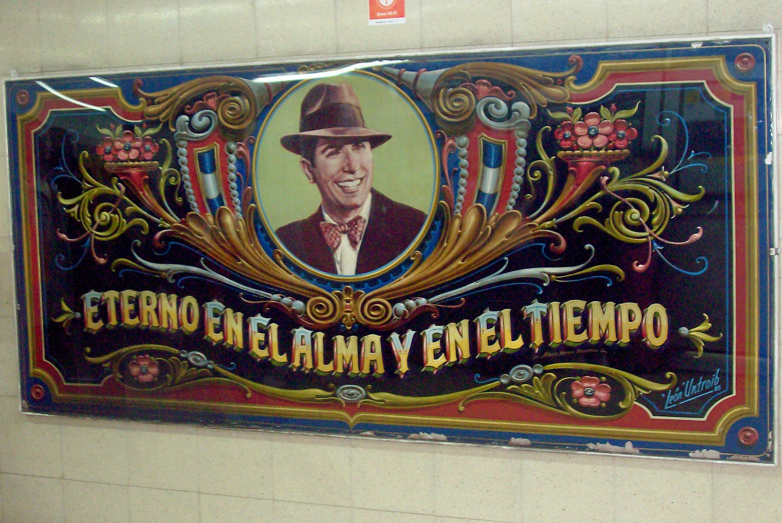 Fileteado, en la estación de subterráneo Carlos Gardel. Buenos Aires, Argentina. Obra de León Untroib